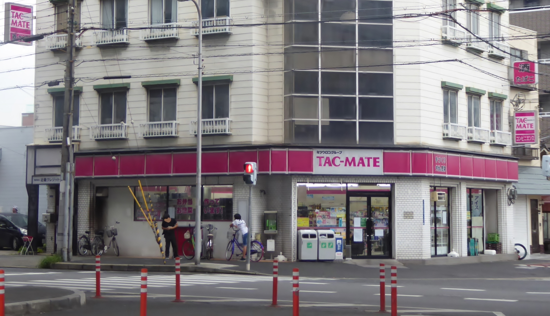 タックメイト（旧・ココストア）南津守店を撮影。